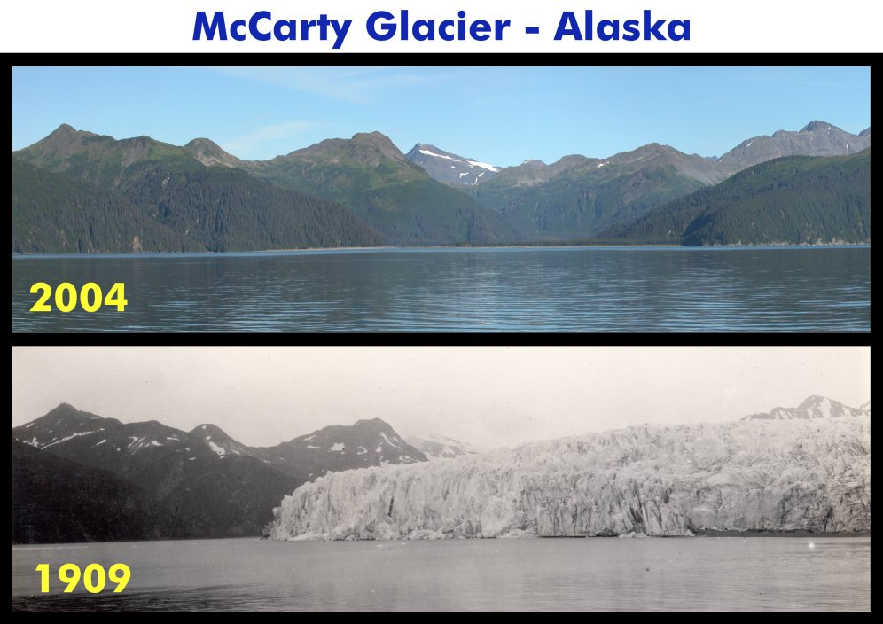 Comparison photos of McCarty Glacier in Kenai Fjords National Park, Alaska. McCarty glacier retreated ~20 km between the period these two photos were taken and is not visible in the 2004 photo. Prior to this, McCarty achieved its maximum known extent circa 1850 approximately 0.5 km from its position in 1909 and was relatively stable at that time 1. Most of the observed retreat occurred before 1964, and this glacier is even known to have advanced some (at least 0.6 km) during somewhat colder conditions in the 1970s, before retreating 0.4 km between 1984 and 2002 (Hall et al. 2005). As McCarty Glacier is a tidewater glacier, i.e. a glacier which terminates in ocean water but is sufficiently thick to keep from floating, its behavior can respond somewhat erratically to climate change. Glaciers of this type are often some of the fastest in retreat because glacier thinning can cause partial flotation and the infiltration of sea water under the glacier that aids in the calving of icebergs and further retreat. As a result the rate of retreat, once triggered by climate perturbations, may more strongly correlate to channel depth than to the actual changes in temperature or precipitation (Vieli et al. 2002).